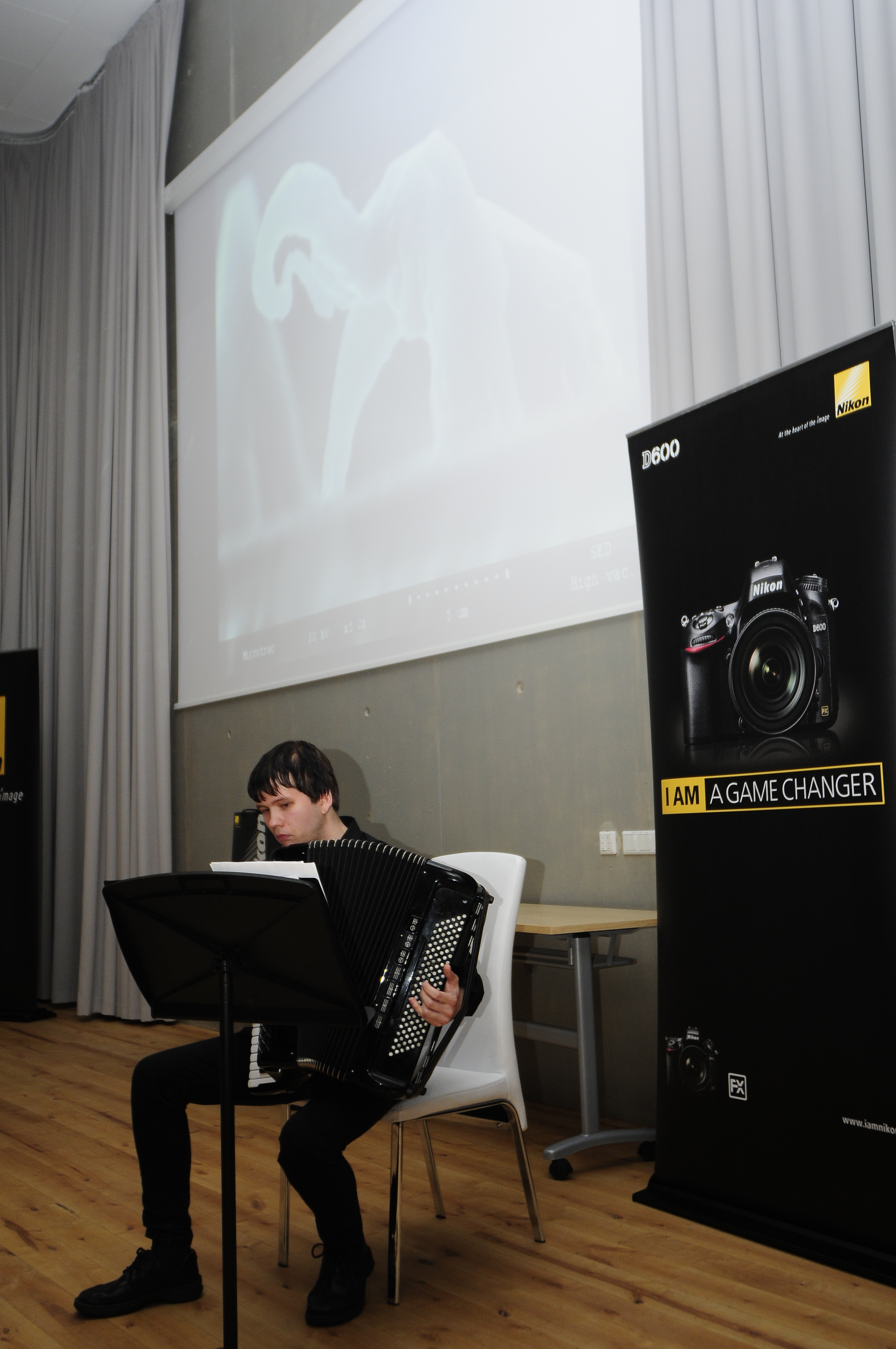 Teadusfoto 2012 lõpuüritus. Akordionil Anti Ingel.